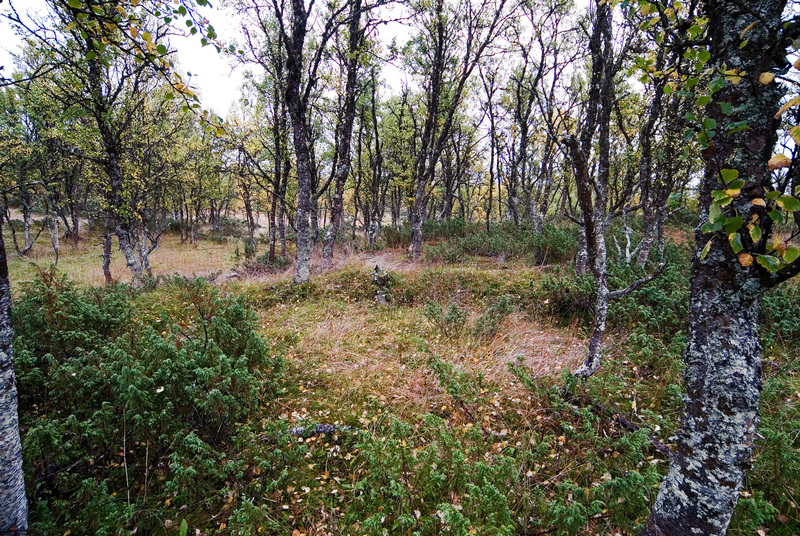 Marsfjället RAÄ 1563, Vilhelmina sn, härd, källargrop och stalotomt, 20060907.